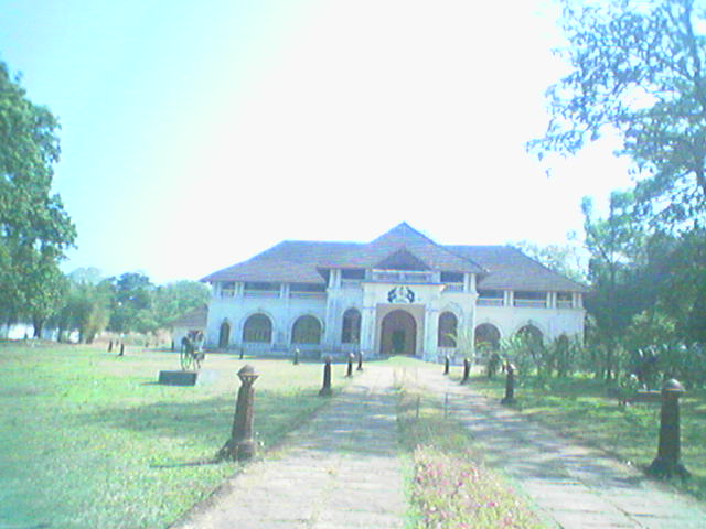 കൊച്ചി മഹാരാജാവായ ശക്തൻ തമ്പുരാന്റെ കൊട്ടാരം